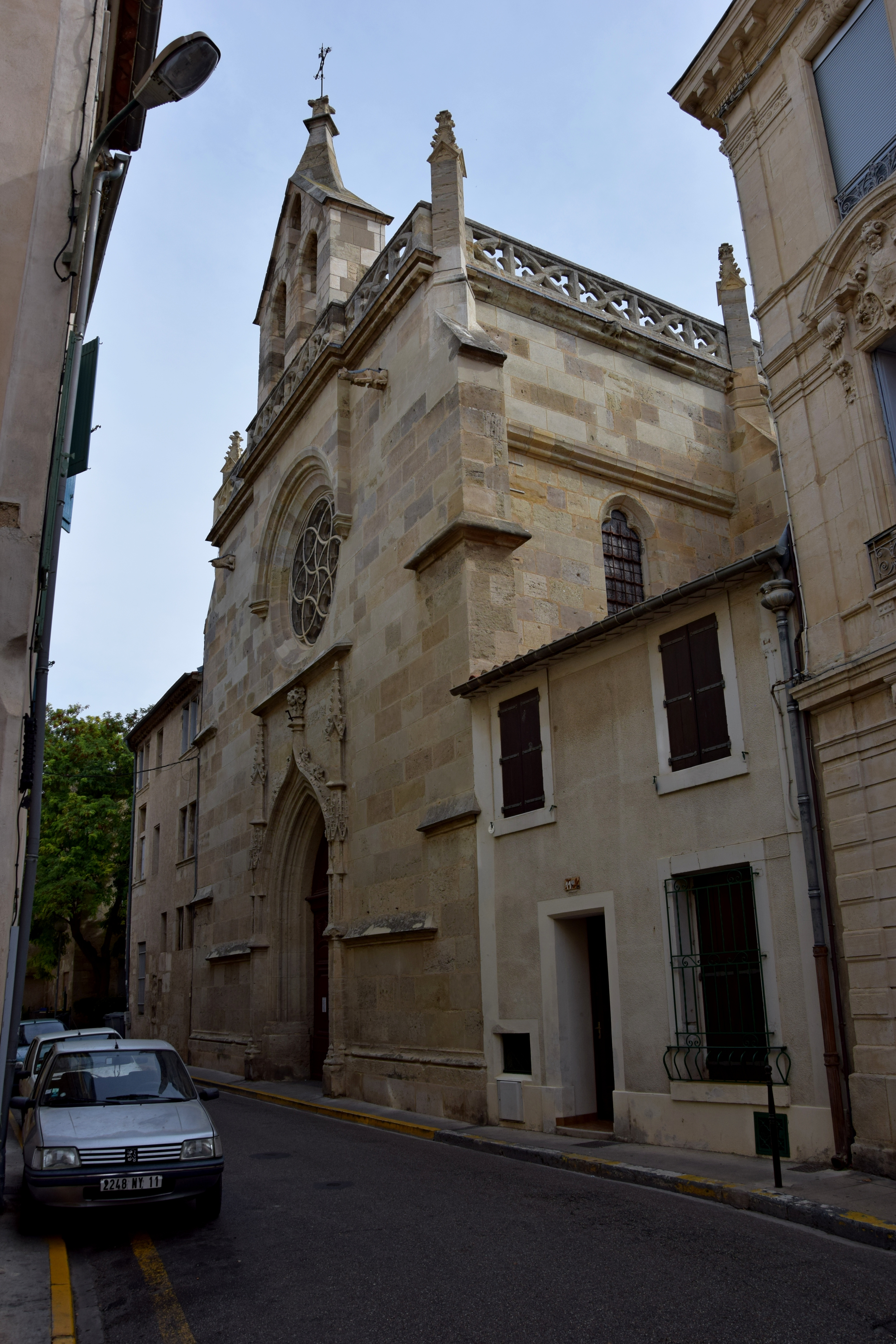 Église Saint-Sébastien, Narbonne .